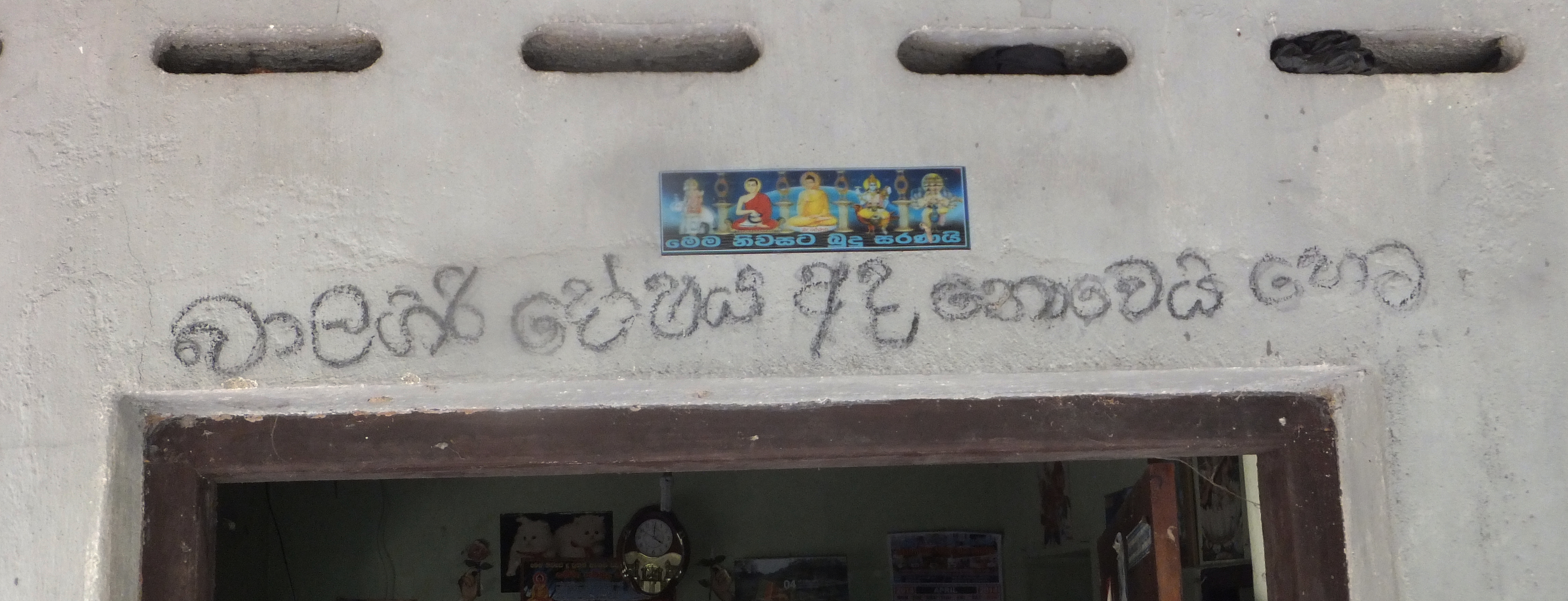 සිංහල: බාලගිරි දෝෂය